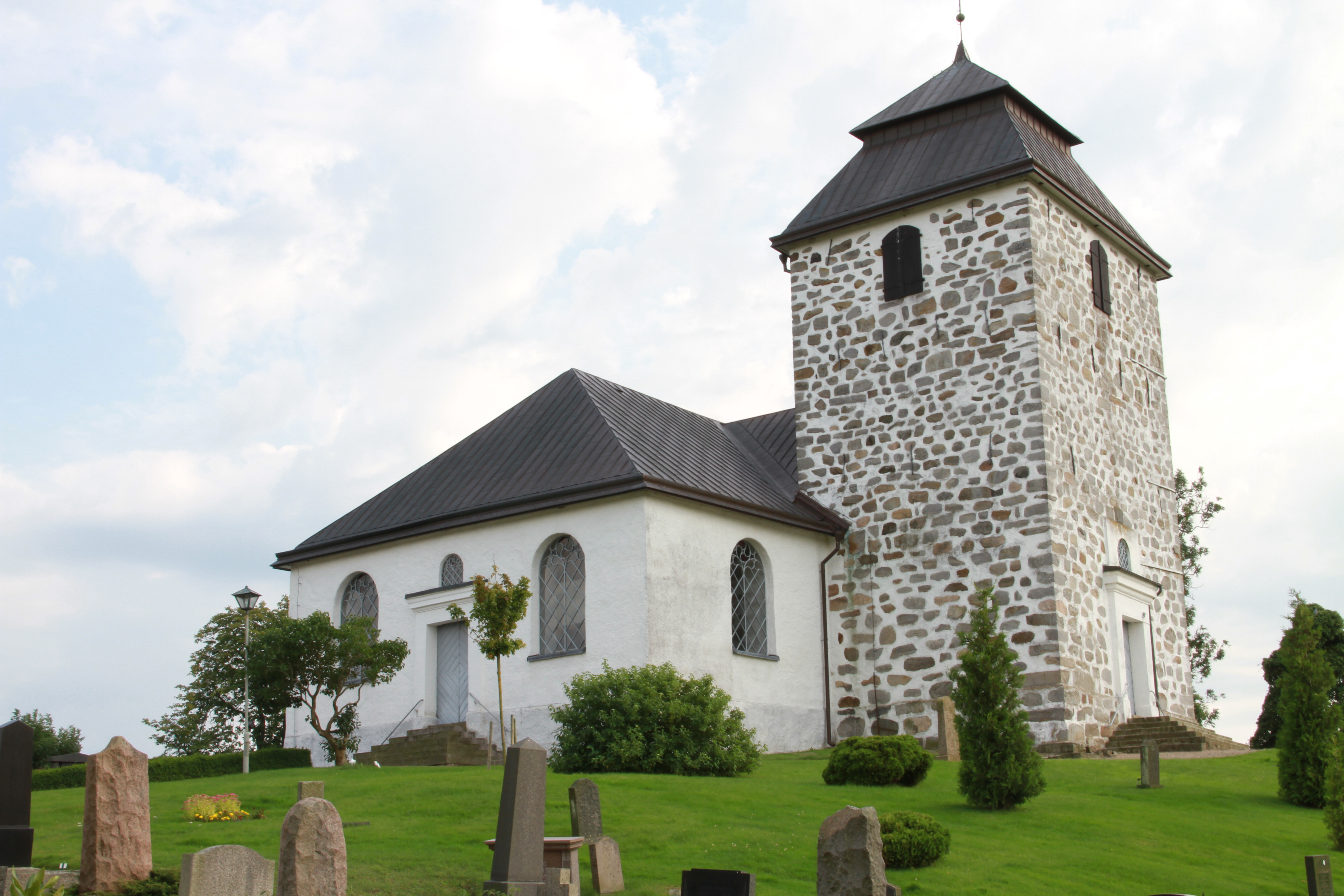 Bild tagen från nordväst